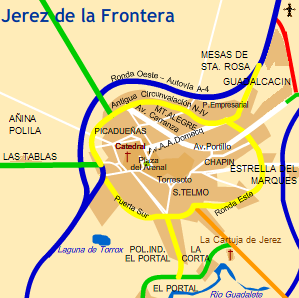 planp de Jerez